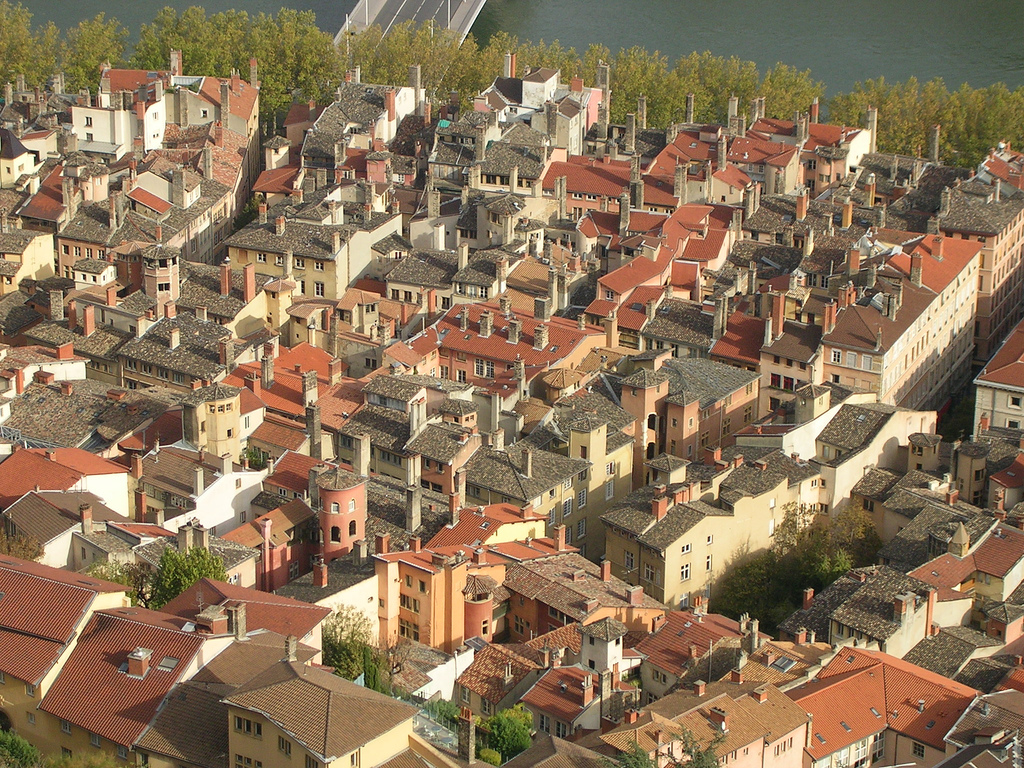 Quartier Saint-Jean, dans le Vieux-Lyon